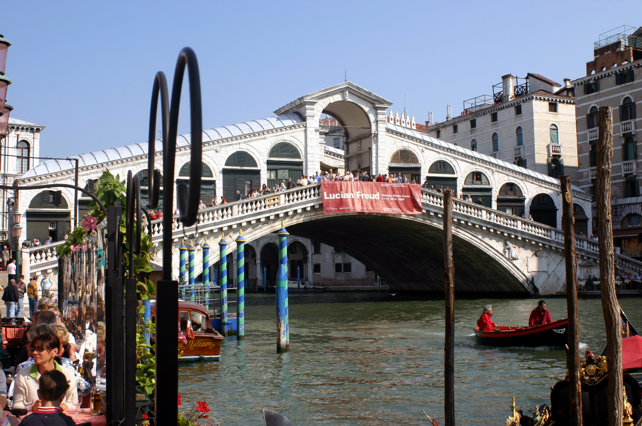 Venezia, Ponte di Rialto